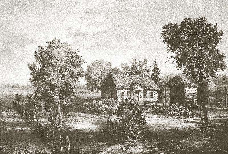 ZAOSIE, (G. Mińska), Niegdyś Własność Stryja Adama Mickiewicza. Adam tu się urodził r. 1798 Grudnia 24 w czasie gdy ojciec jego Mikołaj zarządzał gospodarstwem brata swojego.